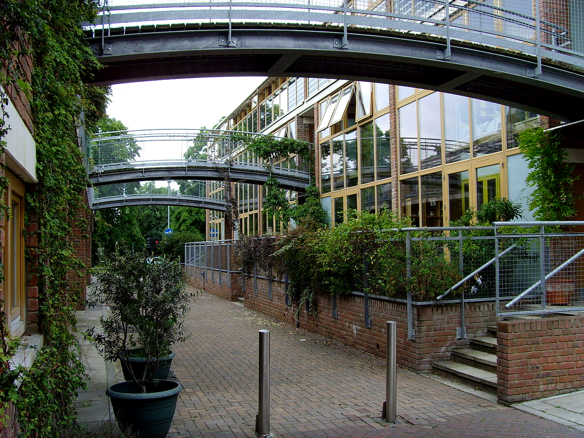 street in BedZED